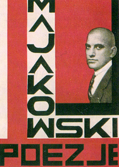 Okładka wydanego w Polsce zbioru poezji Włodzimierza Majakowskiego (Poezje), okładkę zaprojektował Mieczysław Szczuka (zm. 1927).